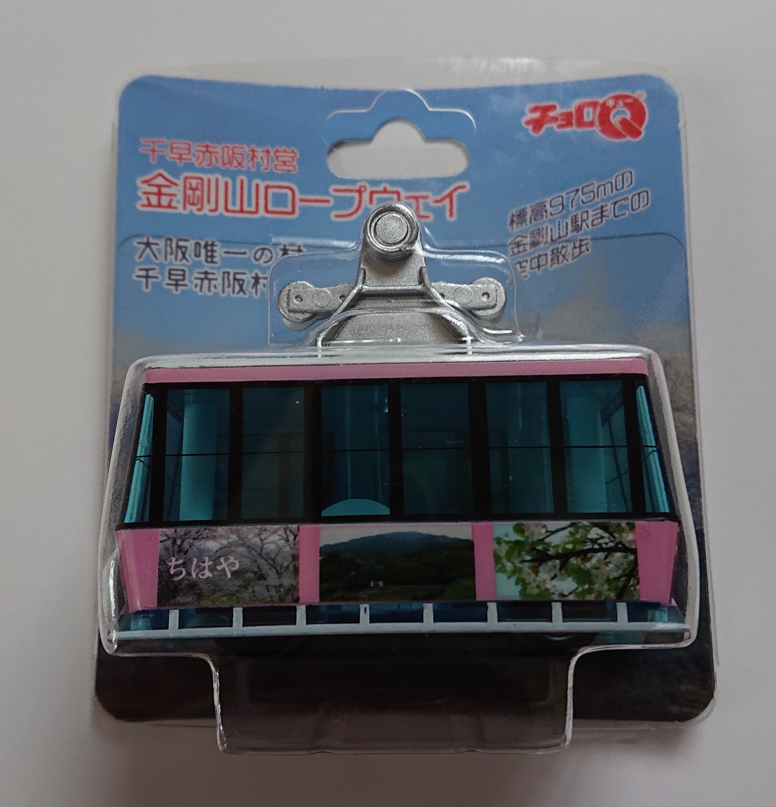 2019年限定発売